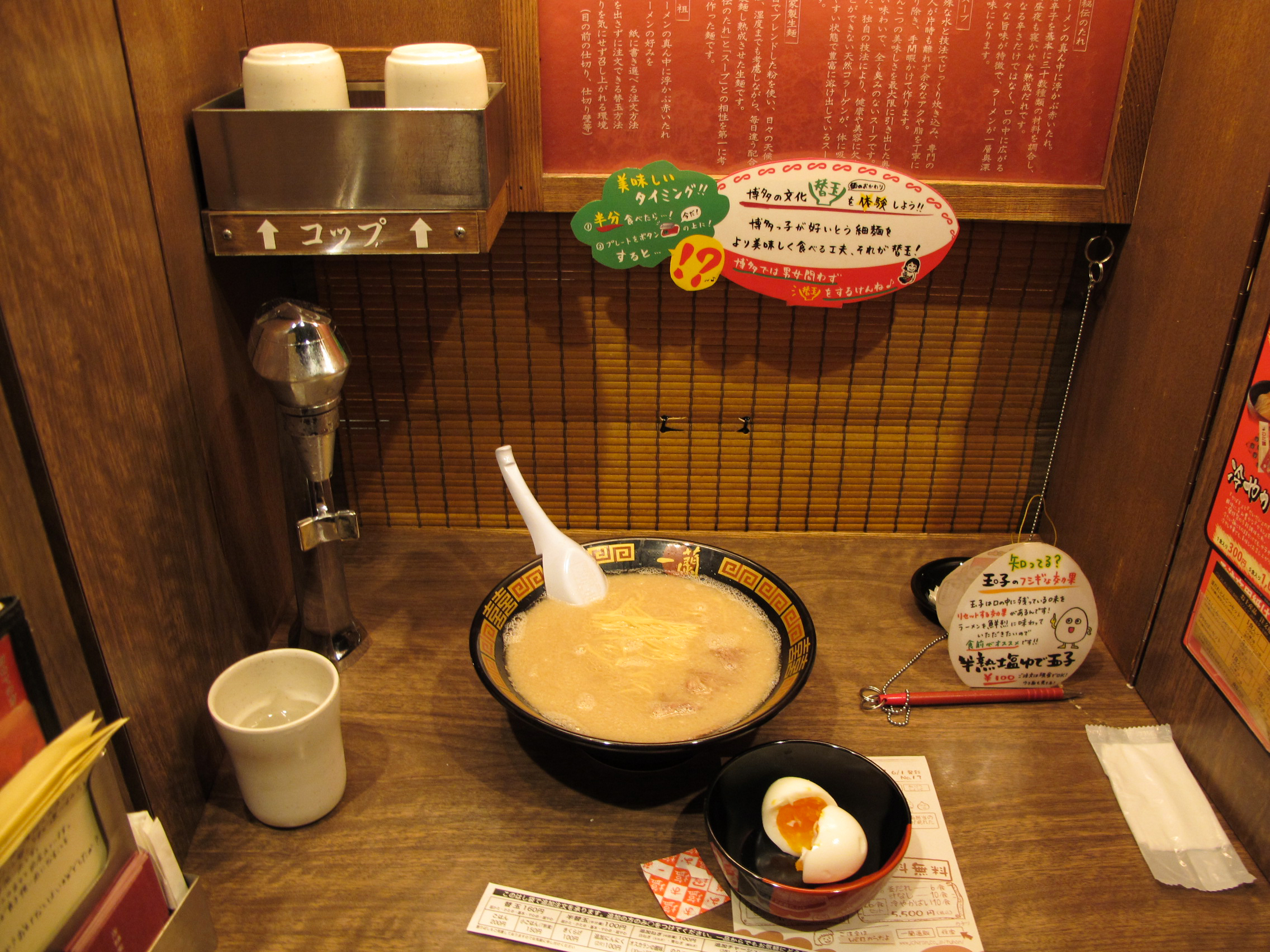 ICHIRAN Food